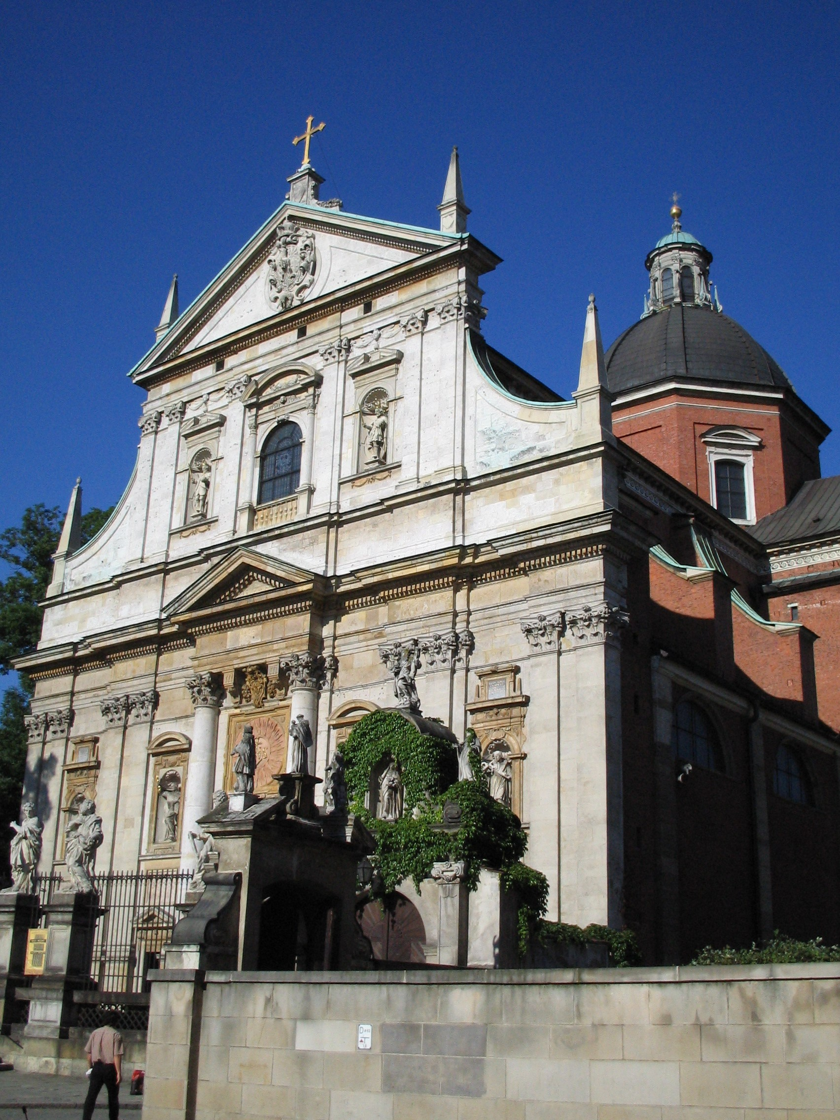 St Peter & Paul Church in Krakow, Poland